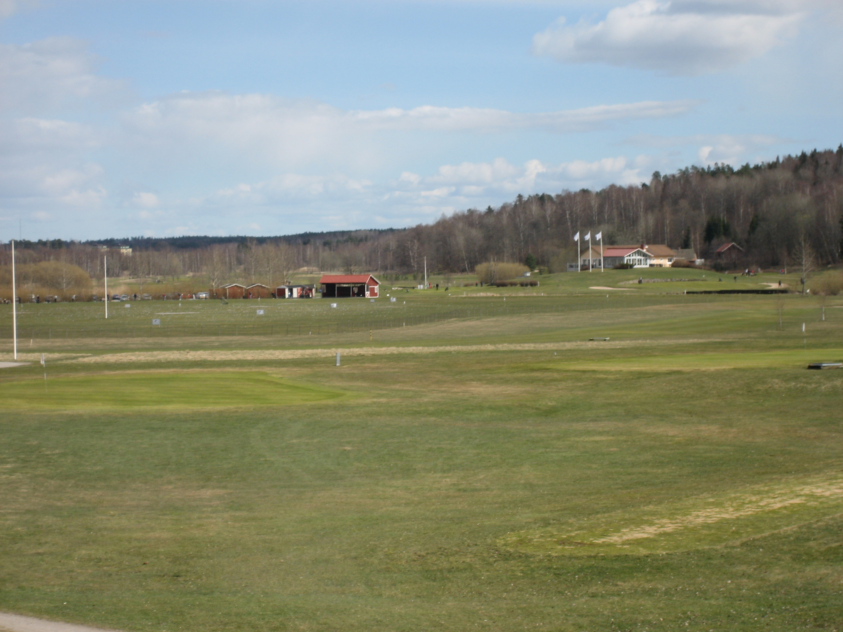 Gustavsviks golfklubb, Örebro